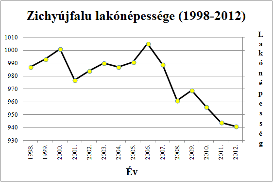 Zichyújfalu népessége